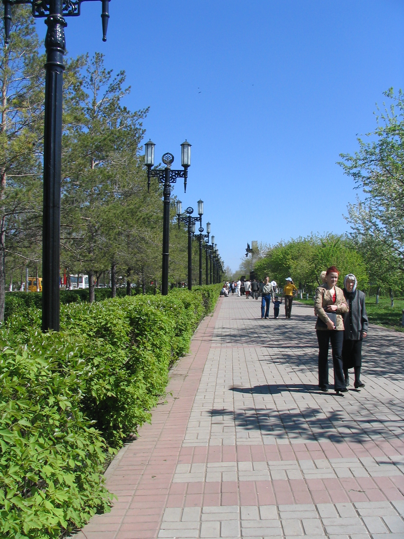 Boulevard in Orenburg, Russia